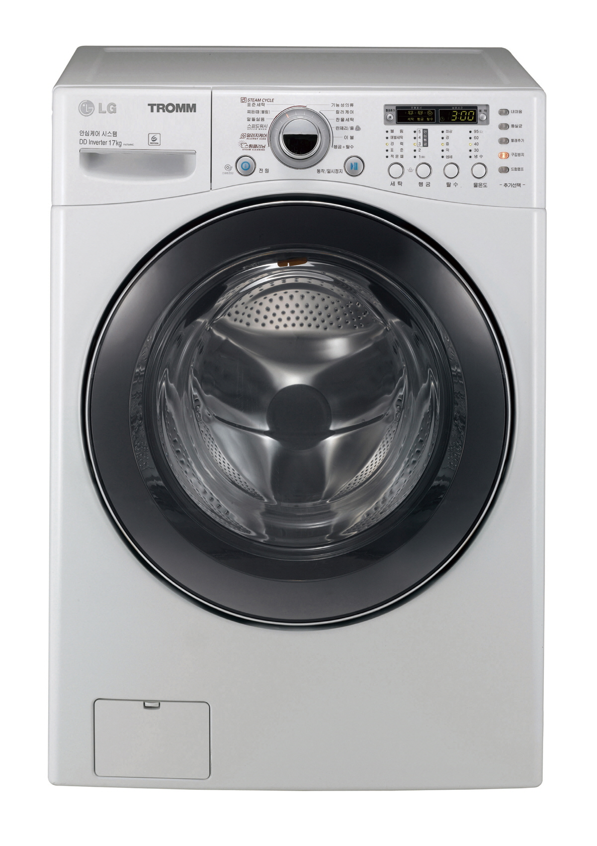 LG전자가 국내 최단 시간인 17분만에 세탁이 가능한 '스피드 워시' 기능적용한 17kg 대용량 건조겸용 트롬 드럼세탁기를 출시했다. 17분 '스피드 워시' 기능이 탑재된 17kg 건조겸용 트롬 드럼세탁기 신제품 (FR4755NQ1Z) ※ LG전자 뉴스룸 에서 관련 보도자료를 확인실 수 있습니다.